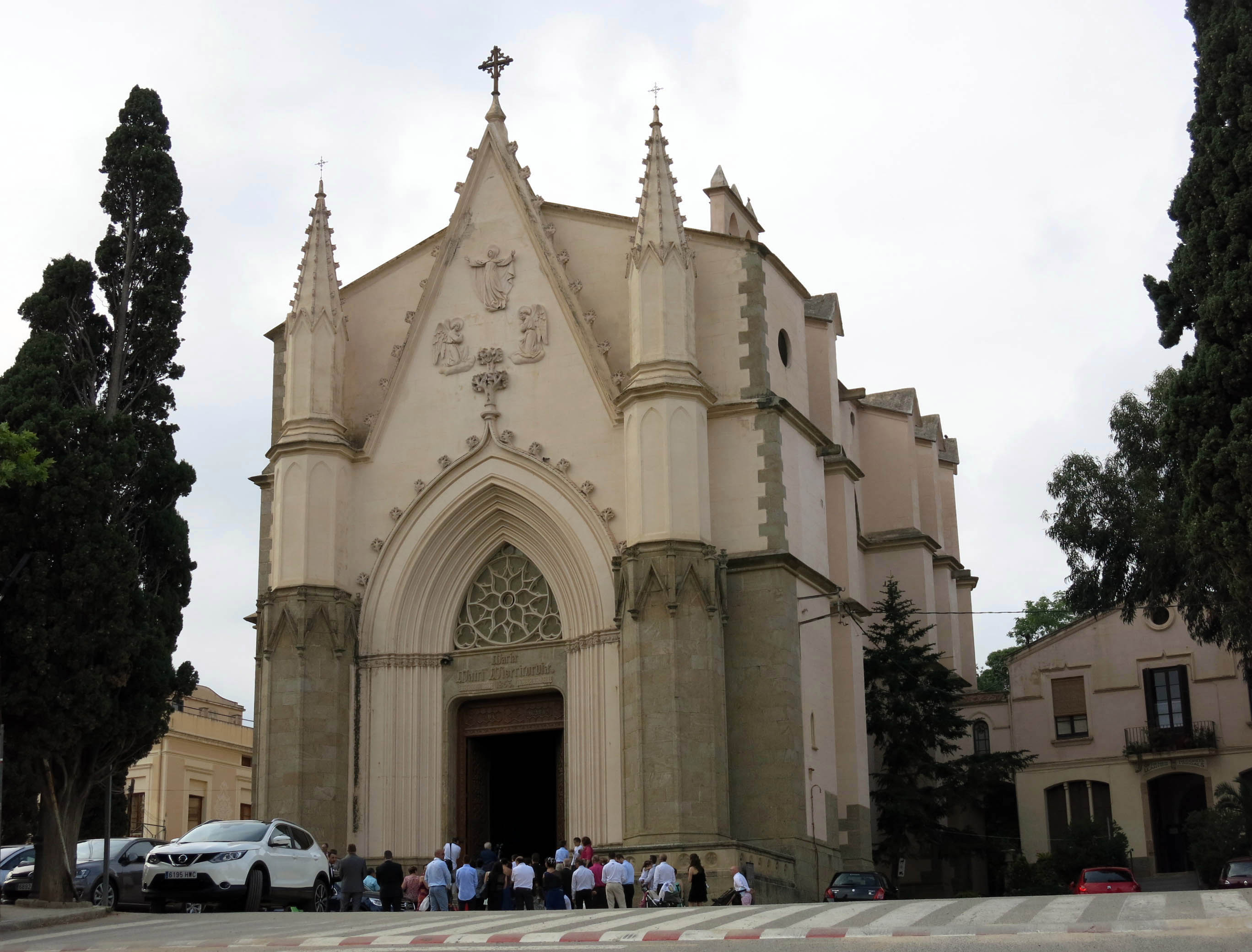 Església del Santuari de la Misericòrdia (Canet de Mar)